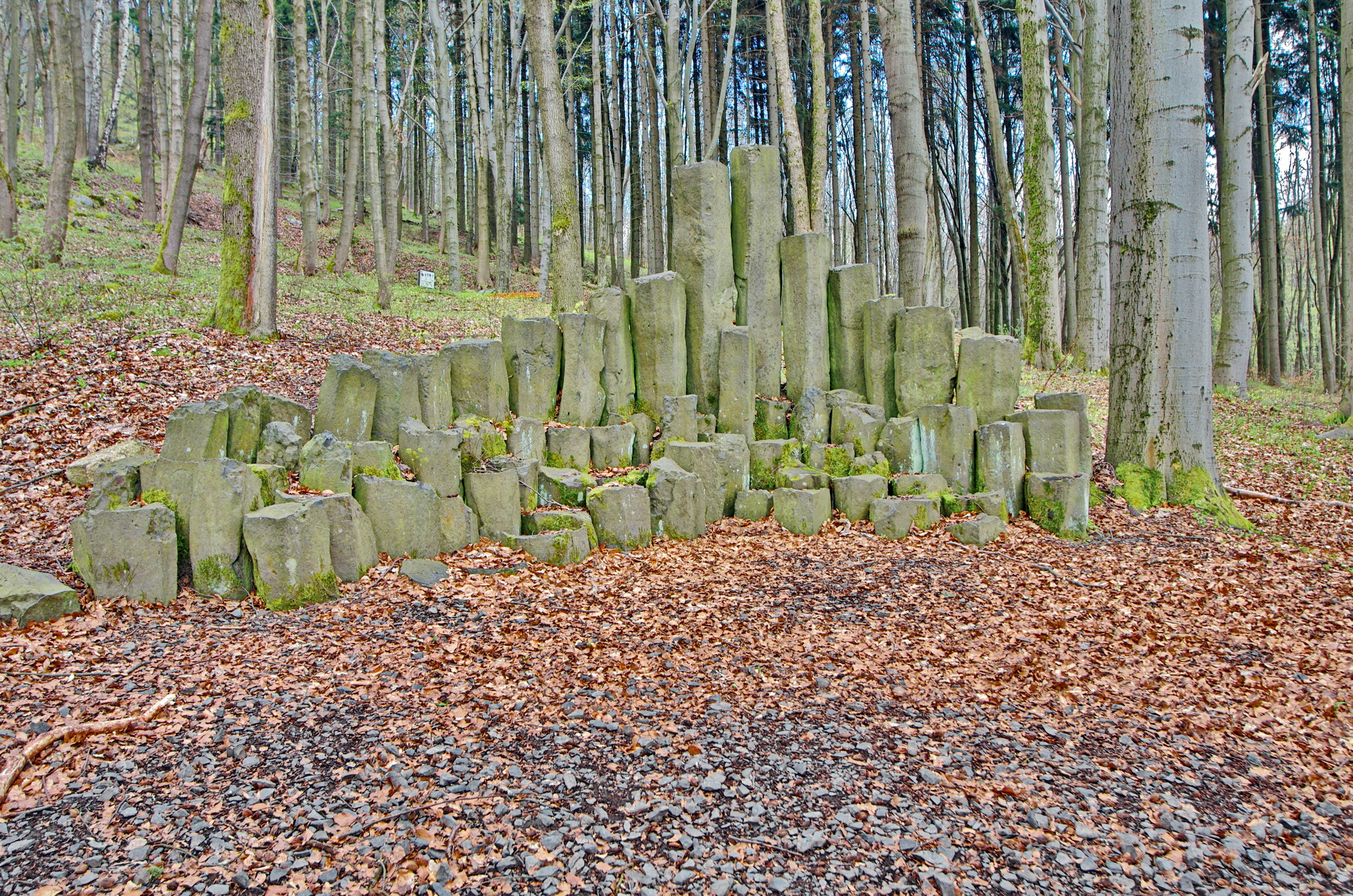 Mariánské Lázně Geopark zastavení č. 17 - čedič